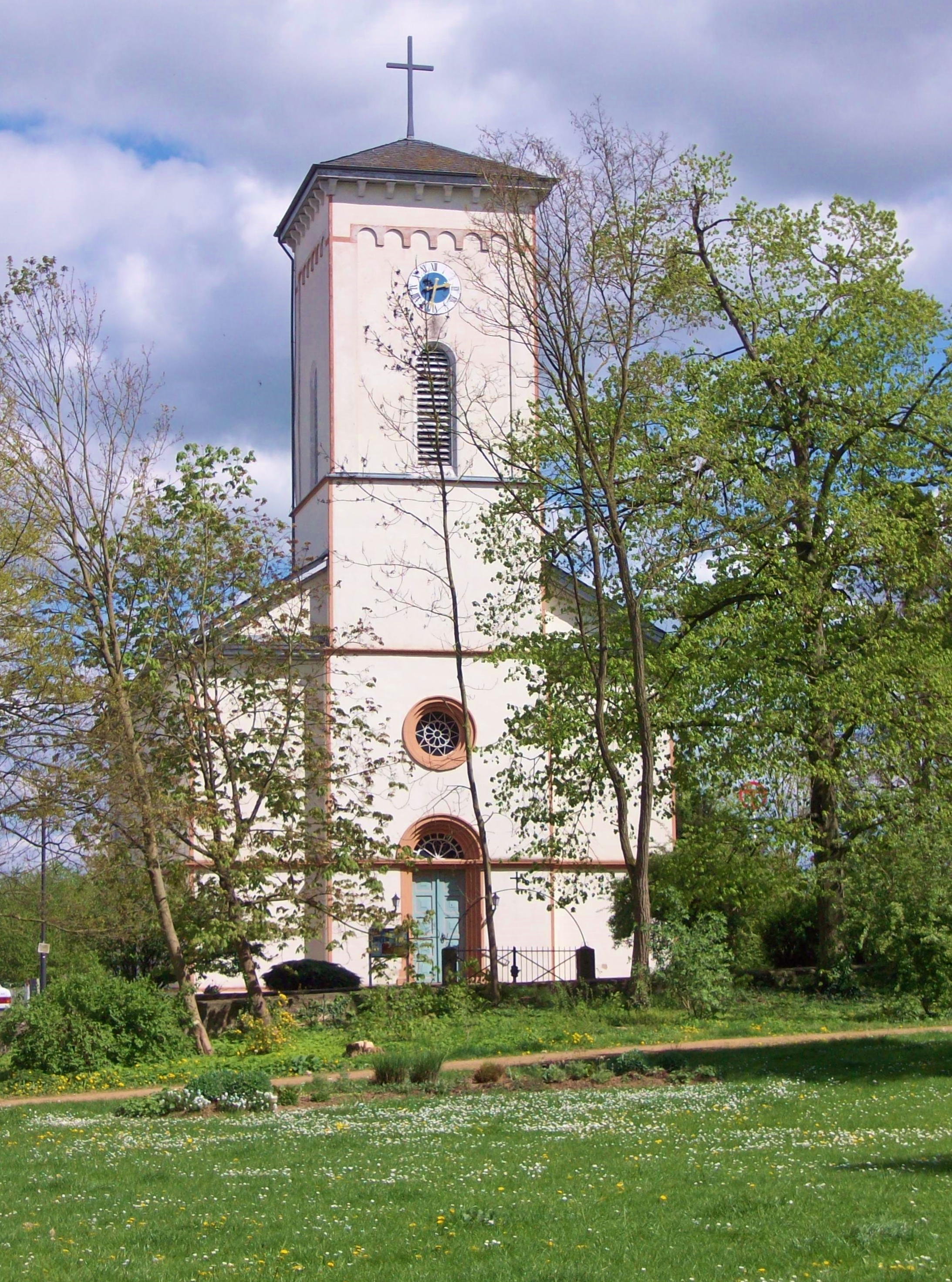 Der Kirchturm der Stadener Kirche